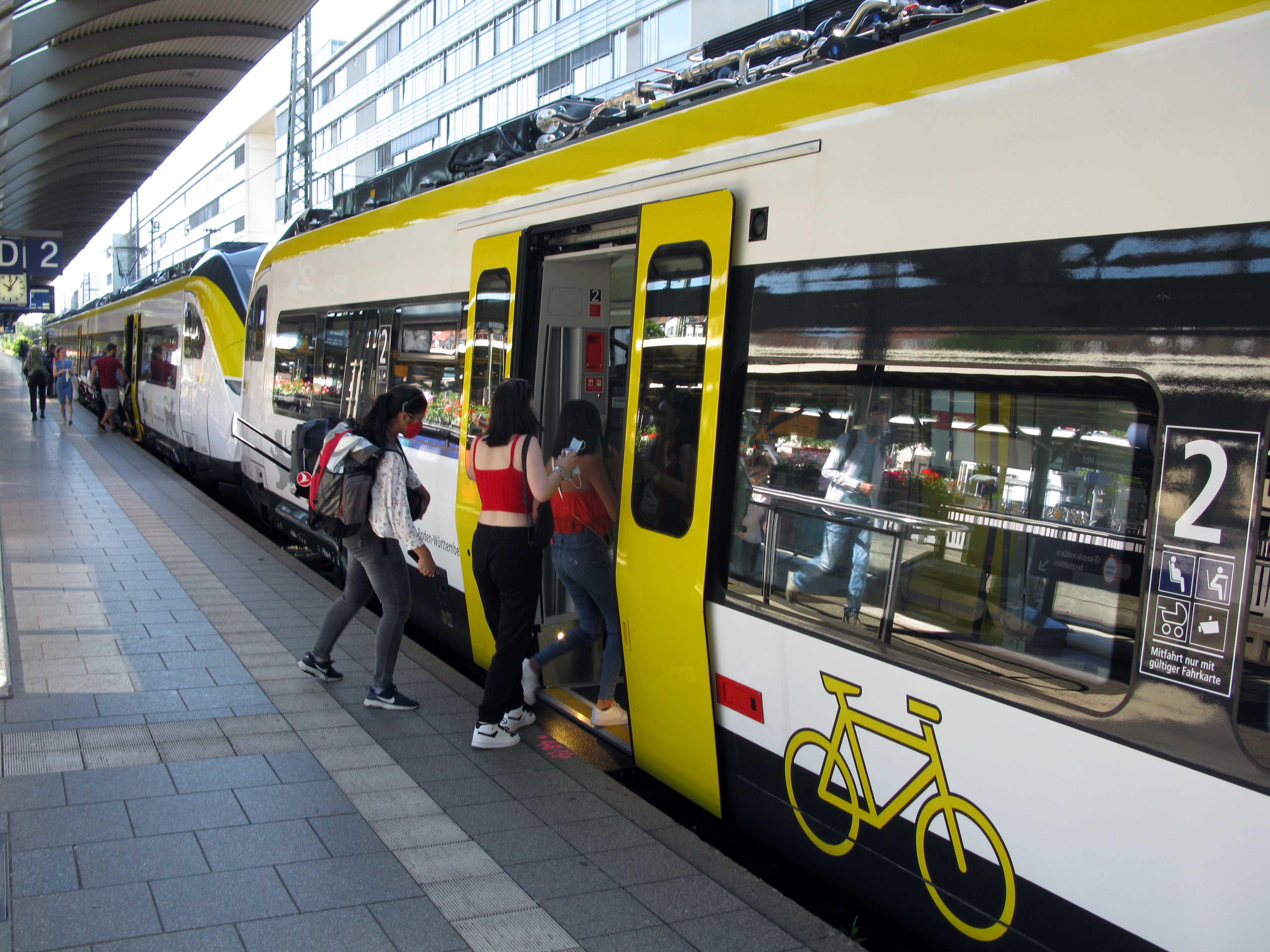 Siemens Mireo im bwegt-Design im Hauptbahnhof Freiburg